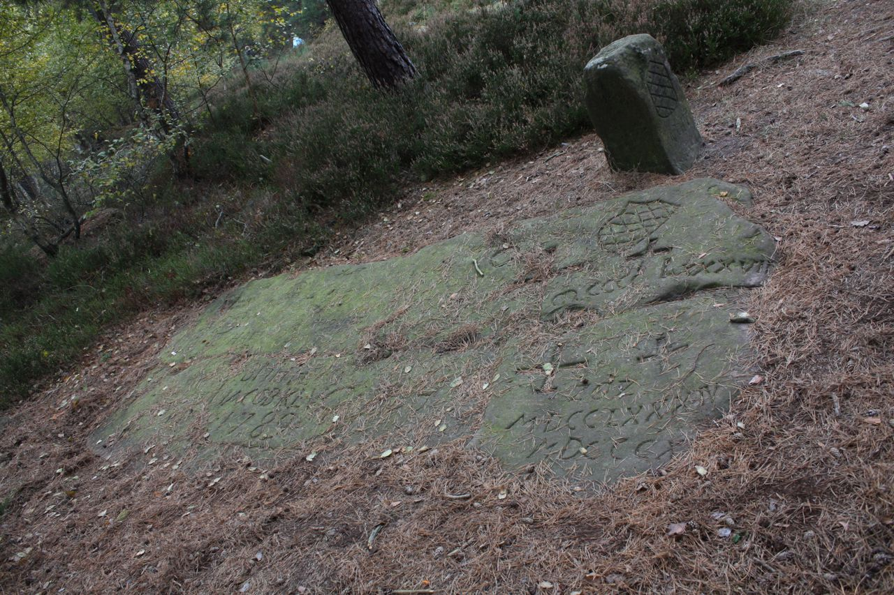 Pfannenstein, ein Grenzstein im Pfälzer Wald bei Deidesheim